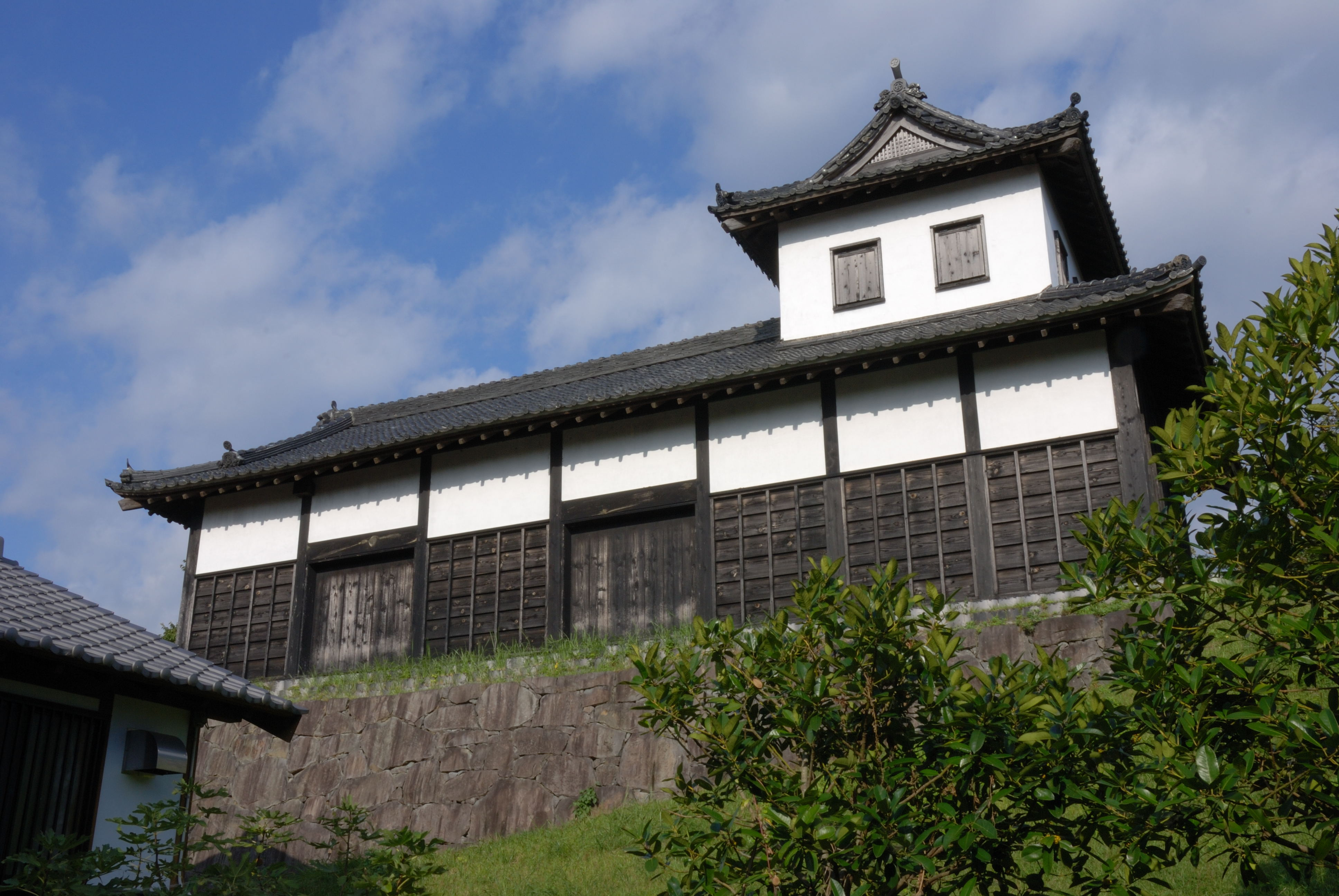 taikoyagura